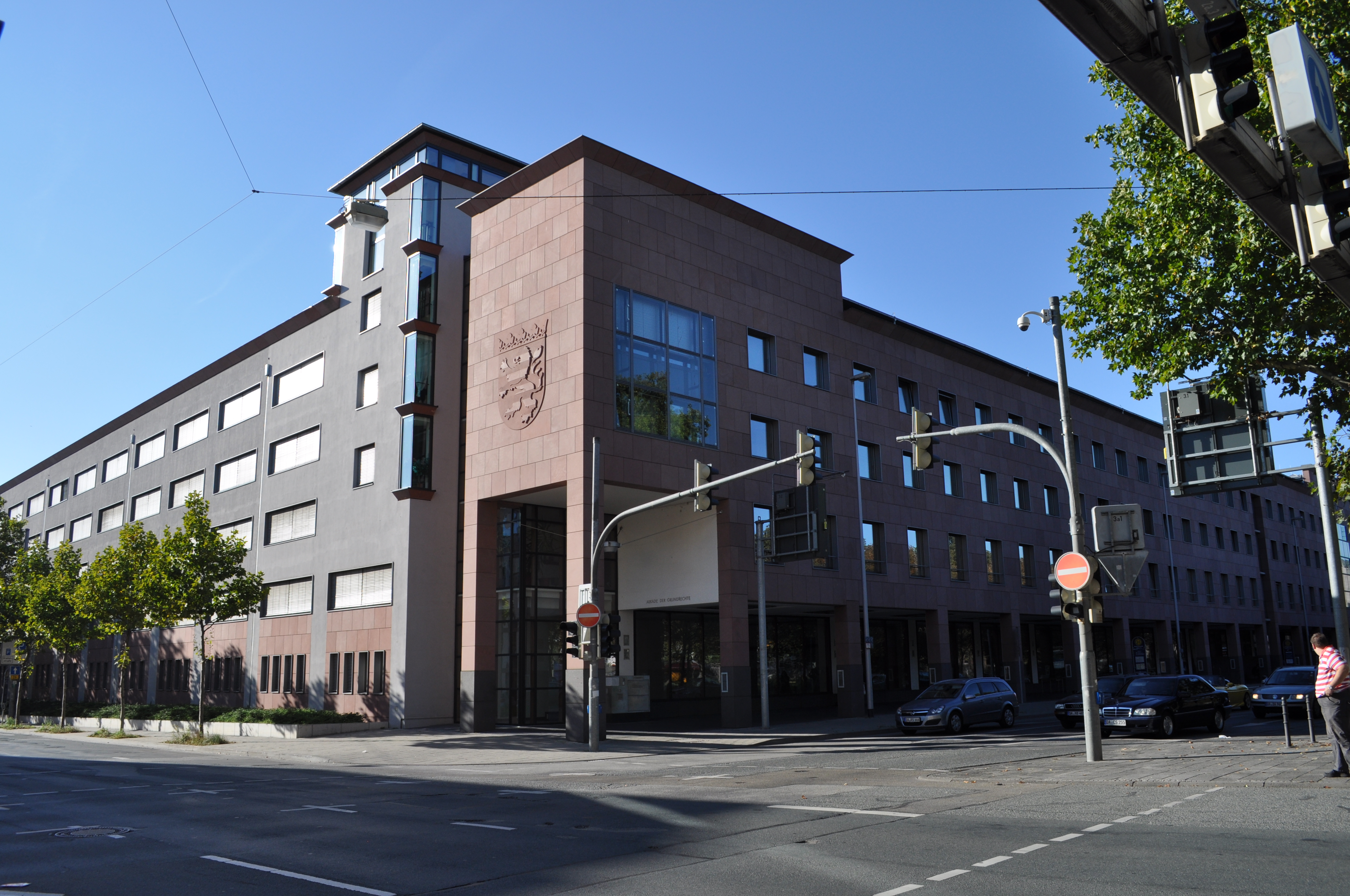 Gebäude des Landgerichtes Darmstadt